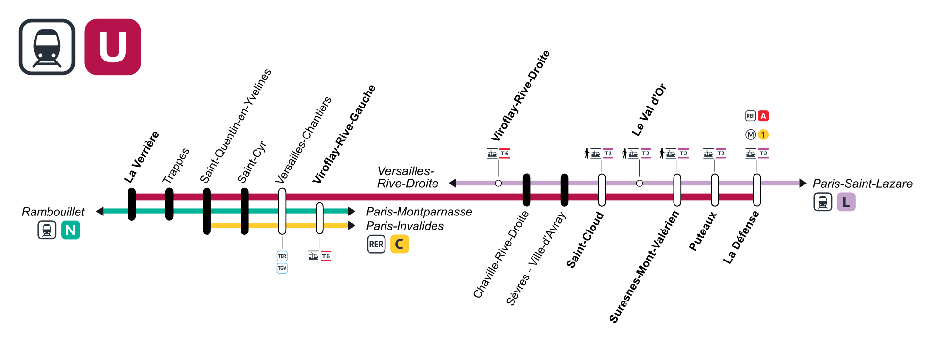 Plan schématique de la ligne U du Transilien avec dessertes parallèles ou complémentaires d'autres lignes Transilien et indication des correspondances (RER, Transilien, métro, tram, autres trains). Version de la ligne en vigueur depuis le 13 décembre 2015.